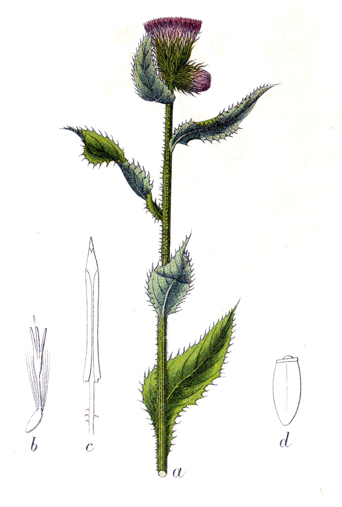 Carduus personata (L.) Jacq. Original Caption Klettenähnliche Distel, Carduus personata